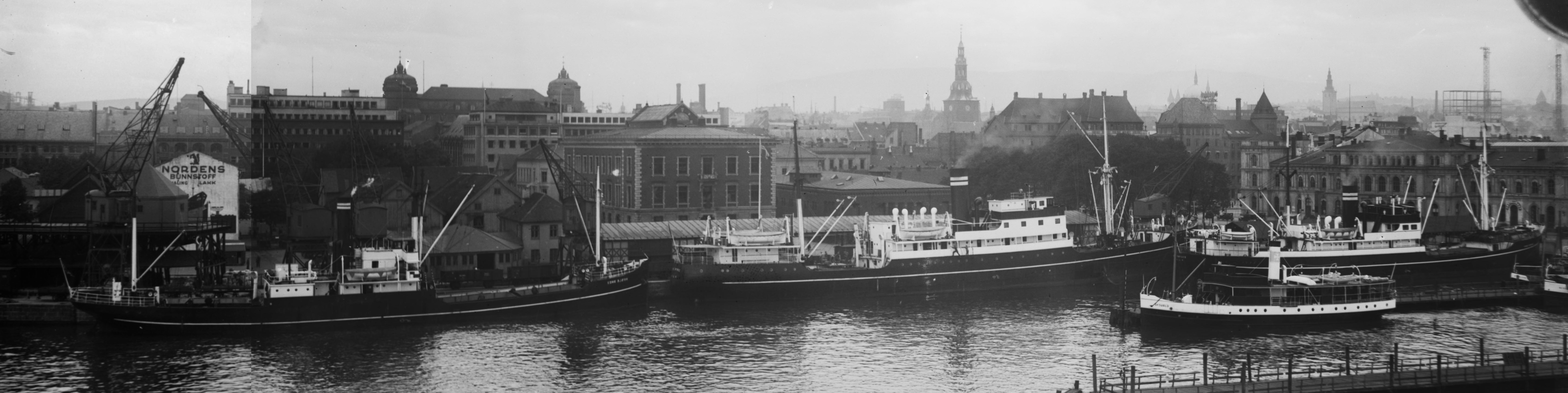 Bildet er hentet fra Nasjonalbibliotekets bildesamling. Anmerkninger til bildet var: Påskrift arkivark: Søndenfjelds Norske dampskibsselskab, Eldste arkivnummer: 1116, [datering fra eksterne]3 skip fra Det Søndenfjelds-Norske Dampskibsselskab (de med to ringer på skorsteinene) fotografert i Oslo. Fra venstre: DS «Kong Bjørn» (1921), DS «Kong Ring» (1929), DS «Kong Trygve» (1931). I forgrunnen DS «Oksvald» (1927) fra Bundefjord Dampskibsselskap, Oslo. Bildene er nok tatt en gang etter 1931 - ikke i 1925 (basert på skipenes byggeår).